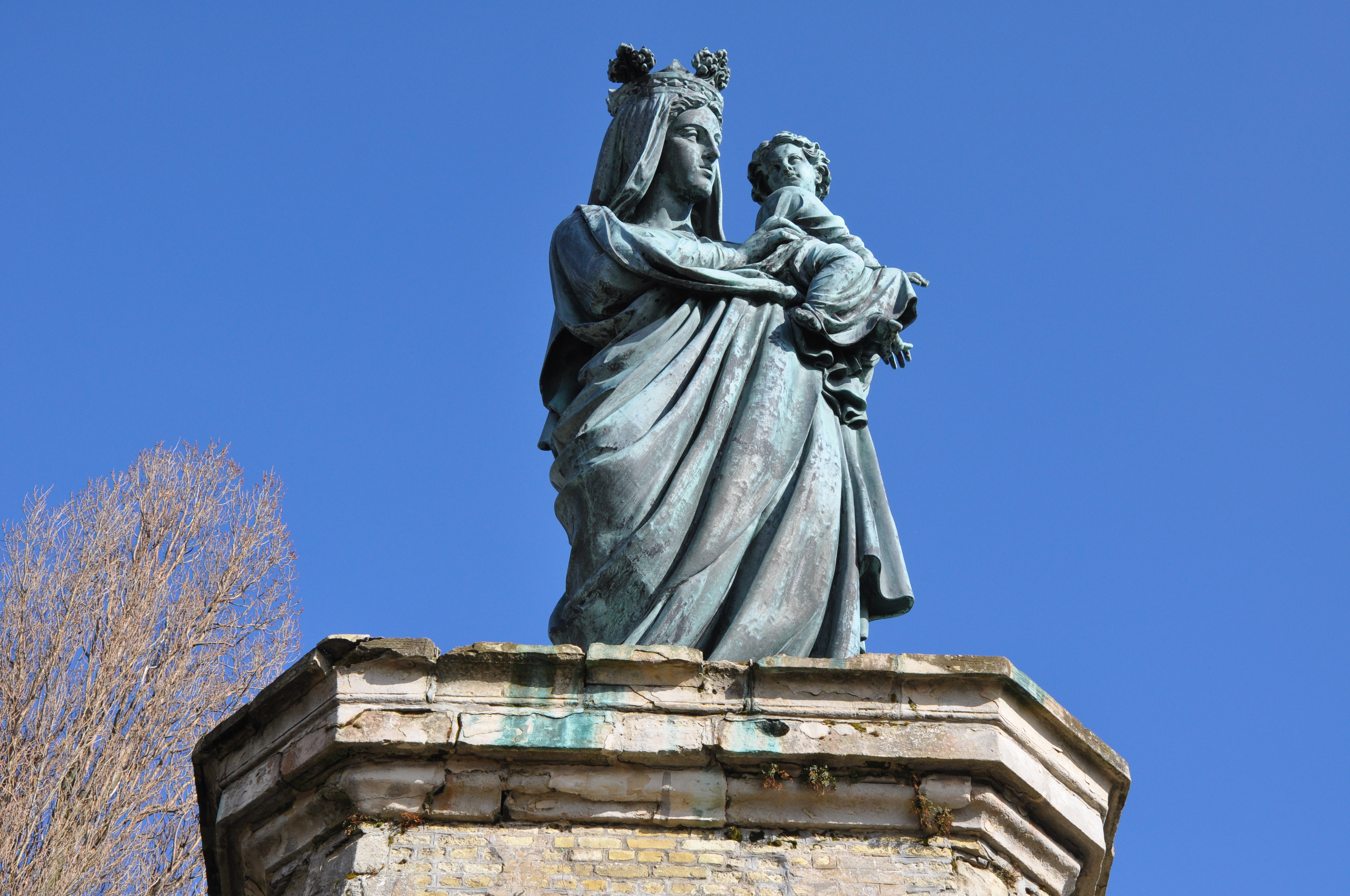 Vierge noire dans les jardins de l'abbaye de Graville au Havre (Seine-Maritime, 76)